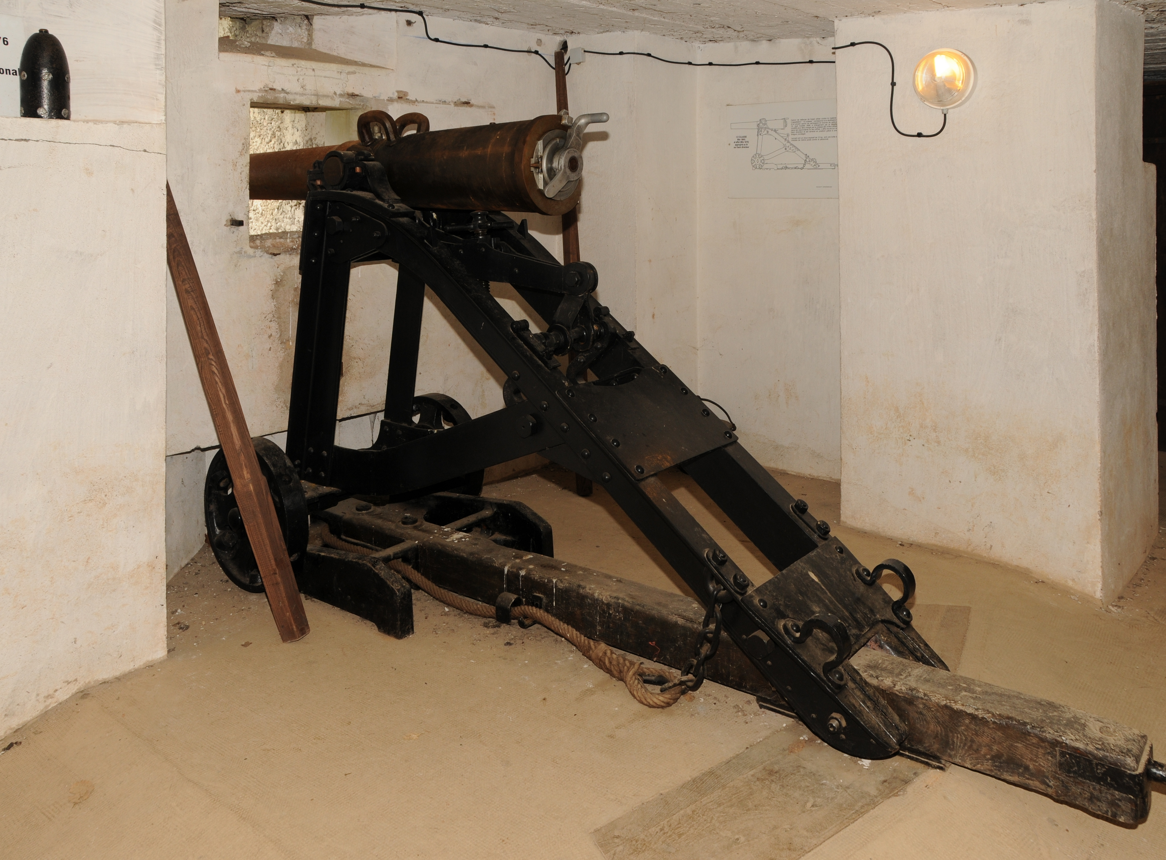 Canon 12 culasse dans le coffre double de contrescarpe Ouest (de saillant II).